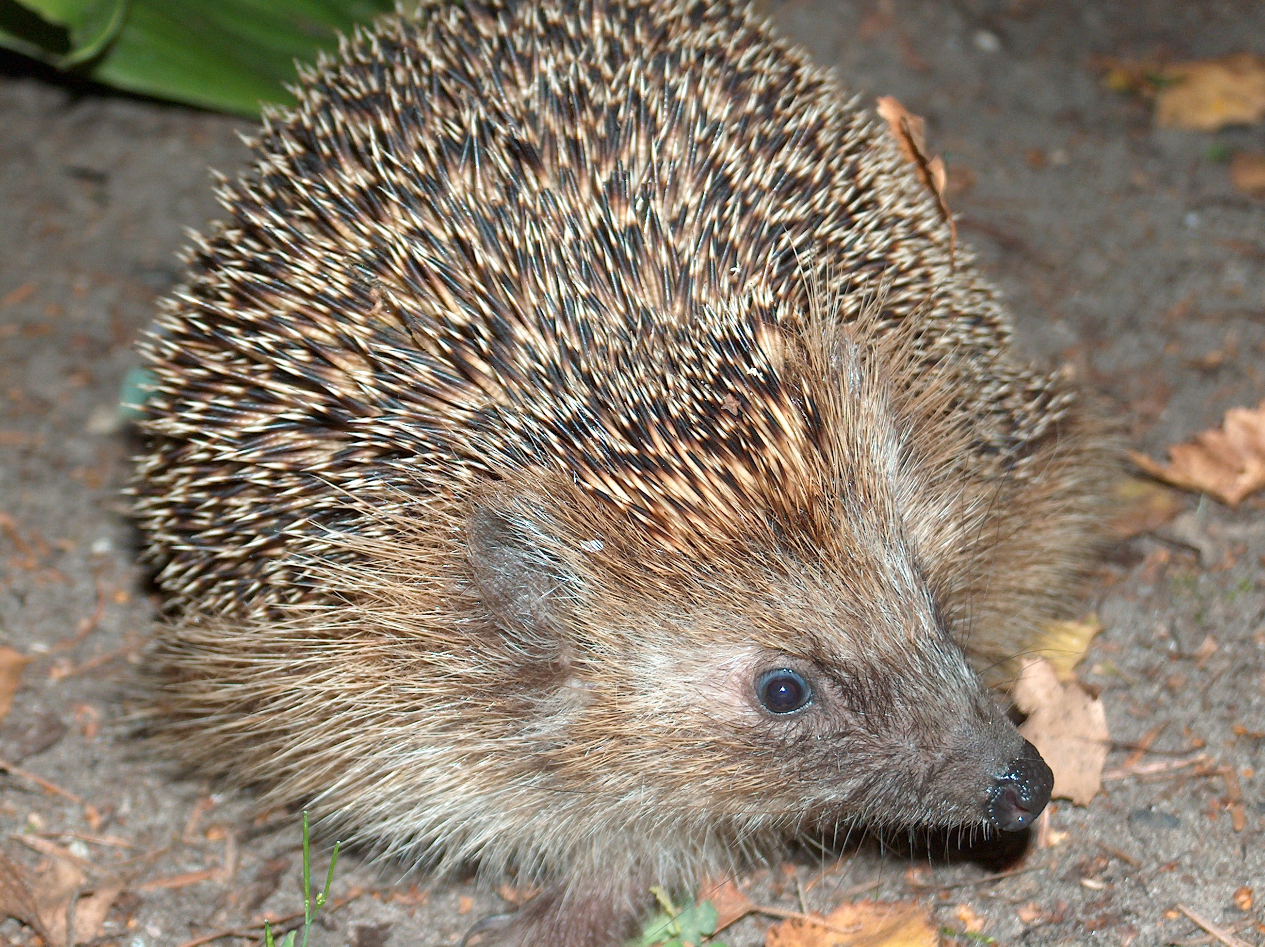 Jeż z okolic Margonina